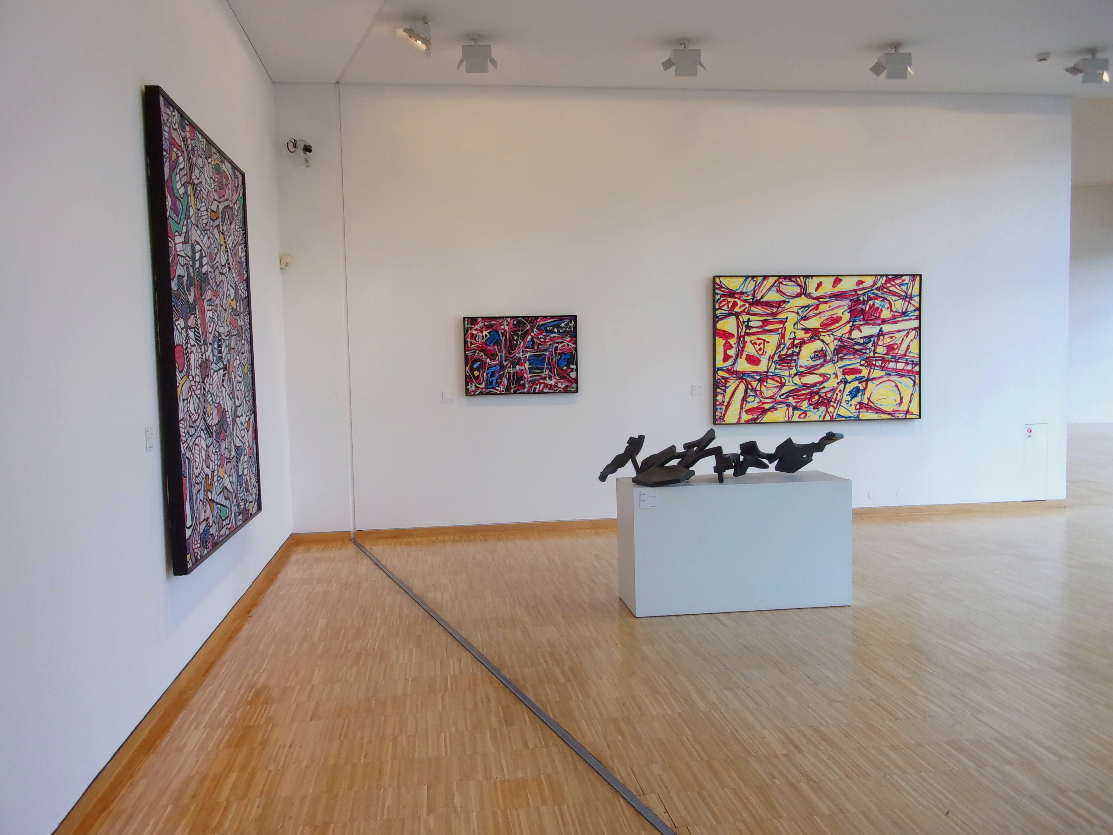 Salle 41 du musée de Grenoble.